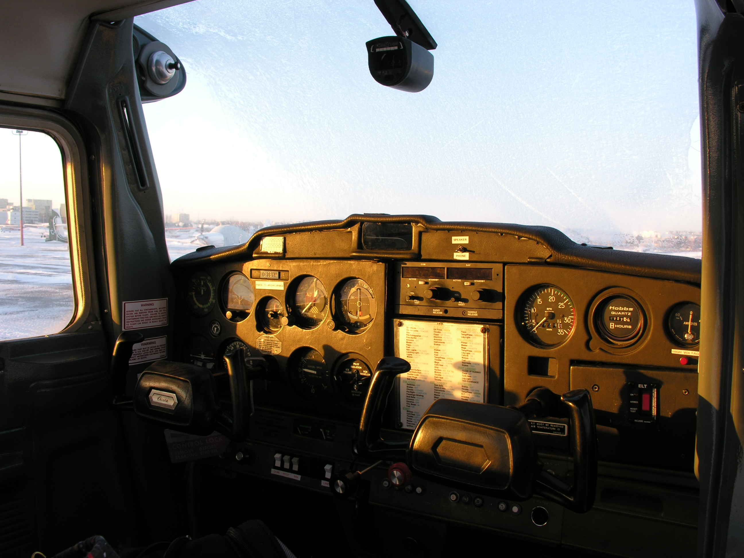 Cessna 150M C-GEYW instrument panel.